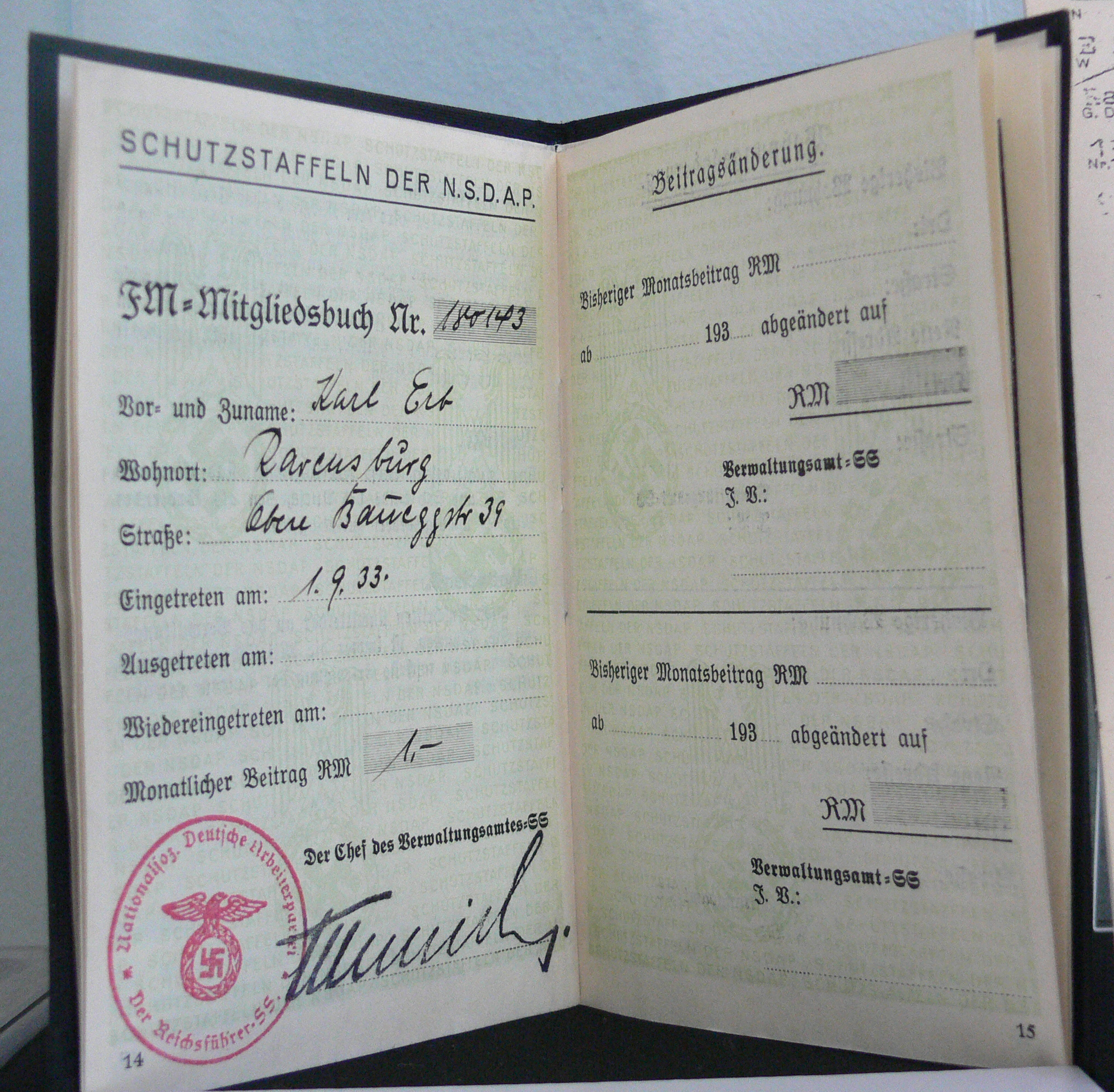 SS-Fördermitgliedsbuch von Karl Erb (1933–1939) Stadtarchiv Ravensburg, Nachlass Karl Erb